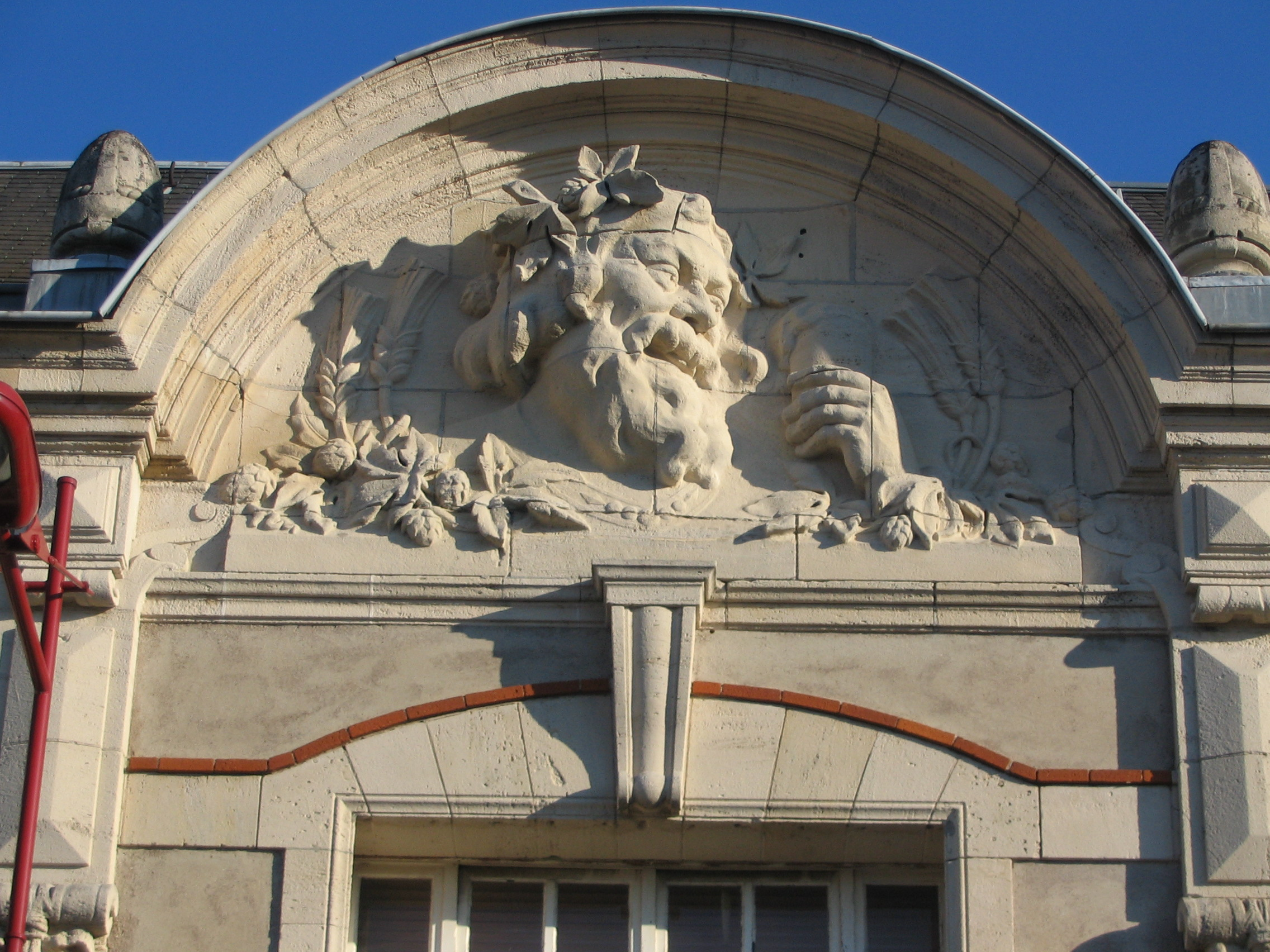 Gambrinus - Tête sculptée par Alfred Finot sur les Grands Bureaux de la Brasserie de Champigneulles (bâtiment détruit en 2009)